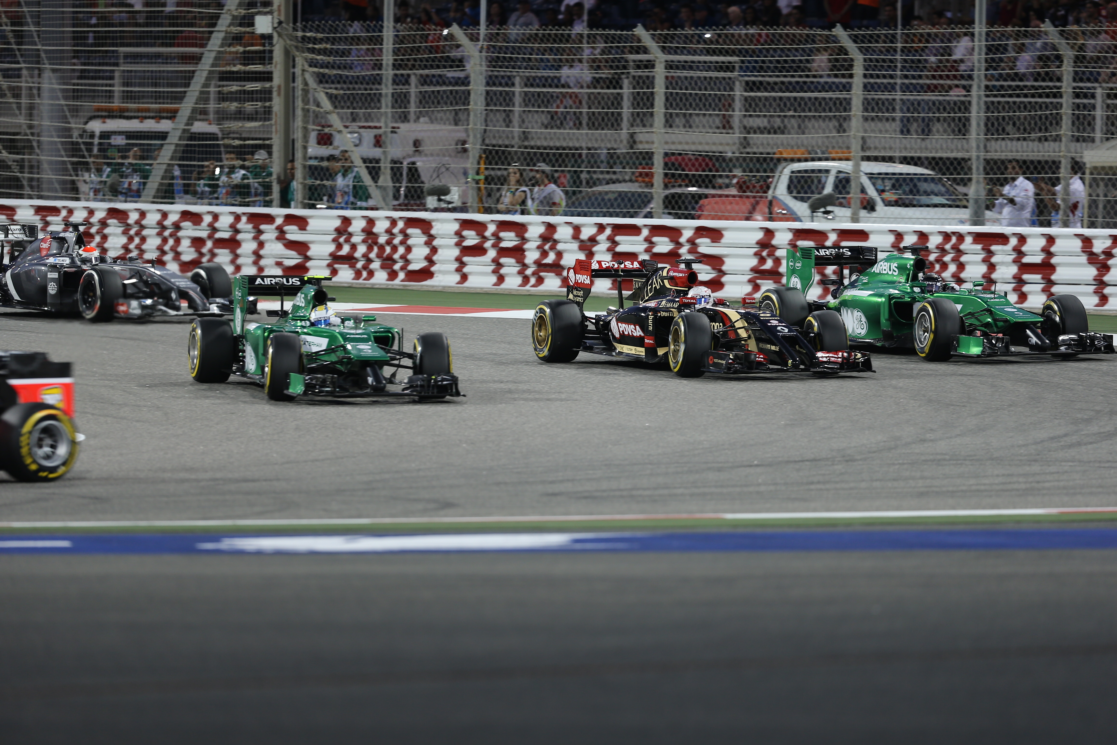 L'arrière du peloton au Grand Prix de Bahreïn 2014